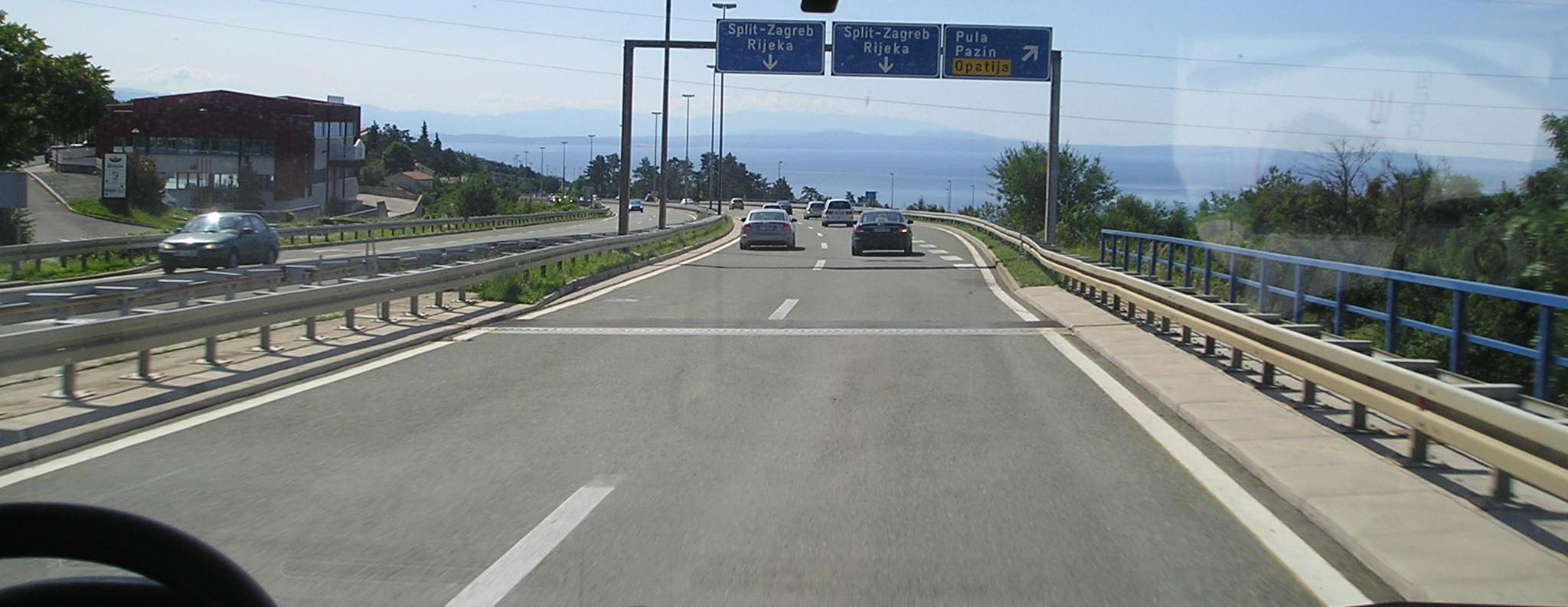 la strada europea E65 a Rijeka